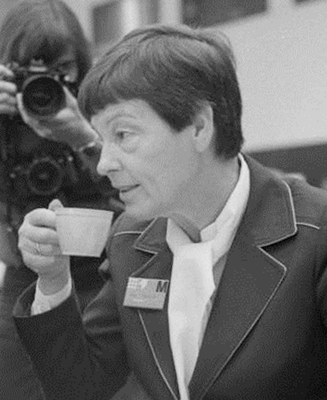 Title: Köln, SPD-Parteitag, Schmidt mit Ehefrau Loki Extra information: Helmut Schmidt mit Ehefrau Hannelore People in the image: Schmidt, Helmut: Bundeskanzler, Verteidigungsminister, SPD, Bundesrepublik Deutschland Factual corrections and alternative descriptions are encouraged separately from the original description. Additionally errors can be reported at this page to inform the Bundesarchiv. Original historic description: Außerordentlicher Parteitag der SPD im Messe-Kongreß-Zentrum in Köln zur Vorbereitung für die Europa-Parlament-Wahl 1979